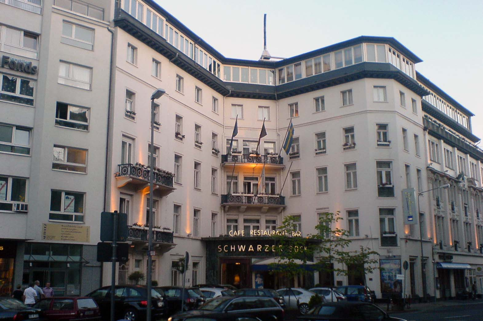 Radisson SAS Hotel "Schwarzer Bock" in Wiesbaden, Germany